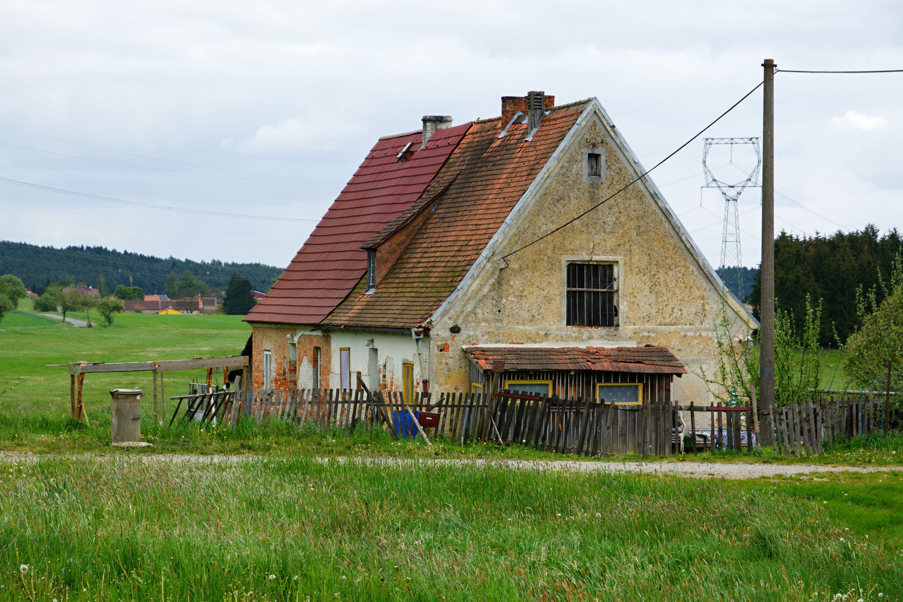 Bonětičky